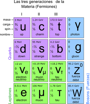 Particles of a boson